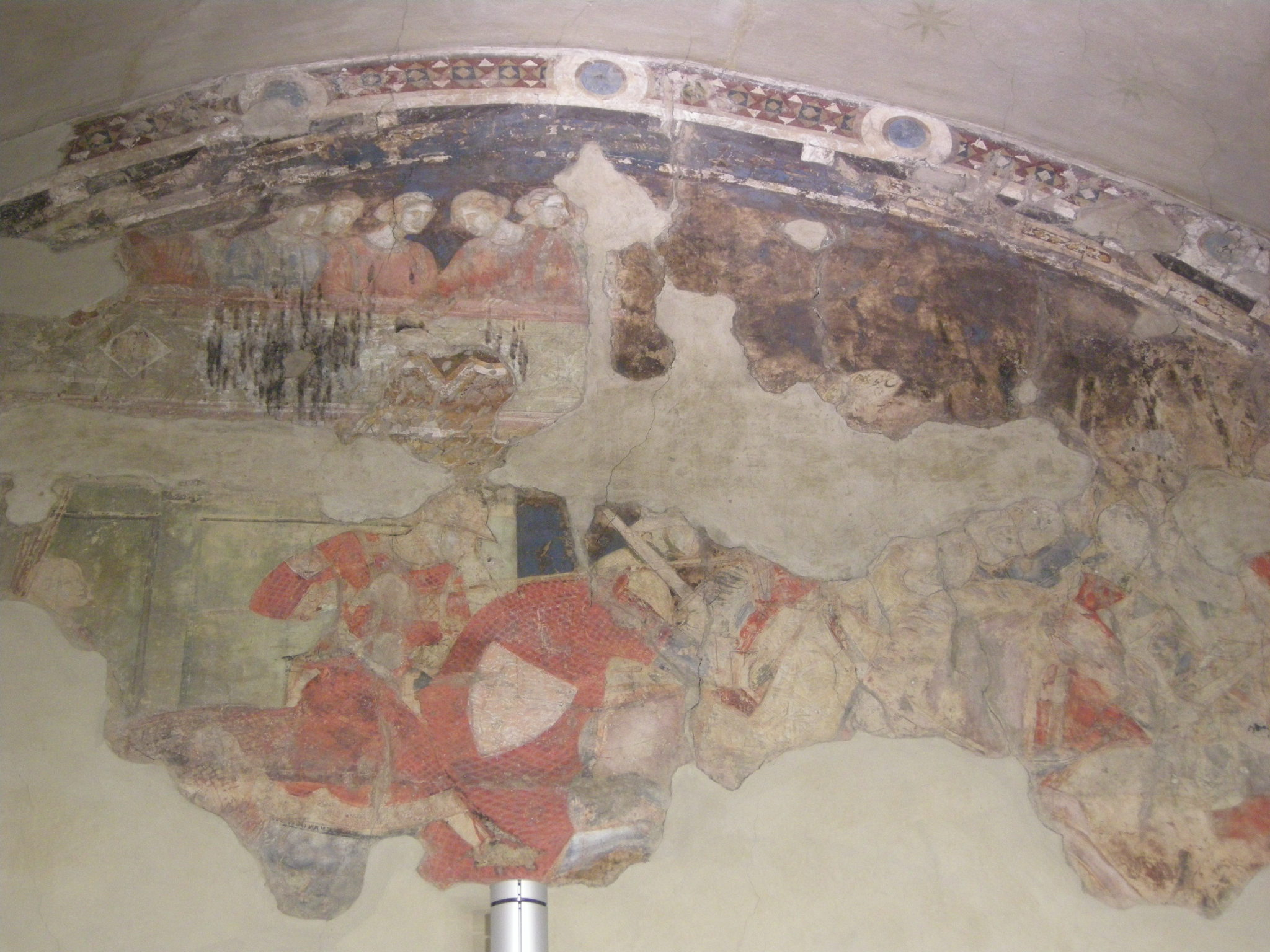 Palazzo dell'arte della lana, affreschi trecenteschi